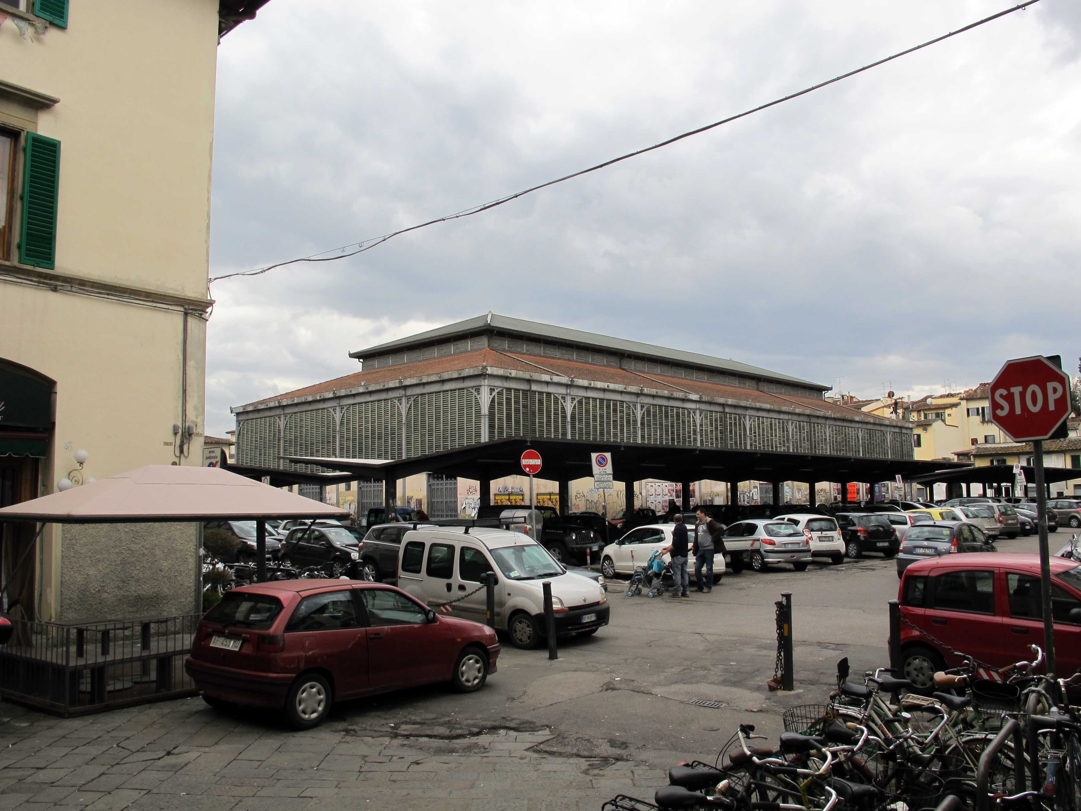 Piazza ghiberti, mercato di sant'ambrogio